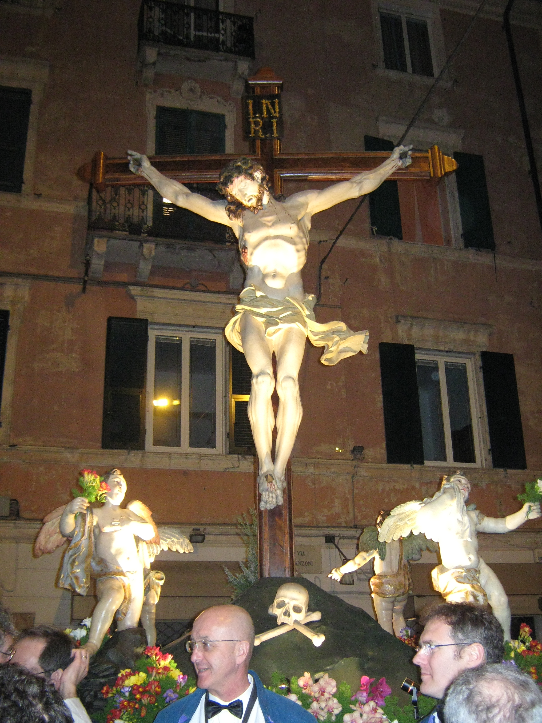 Cassa processionale in legno policromo Cristo morto in Croce, ignoto di scuola romana, sec. XVII. Misure: cm 410x240, base cm 180x180. Confraternita di N.S. di Castello. Processione del Venerdì Santo di Savona 2010.